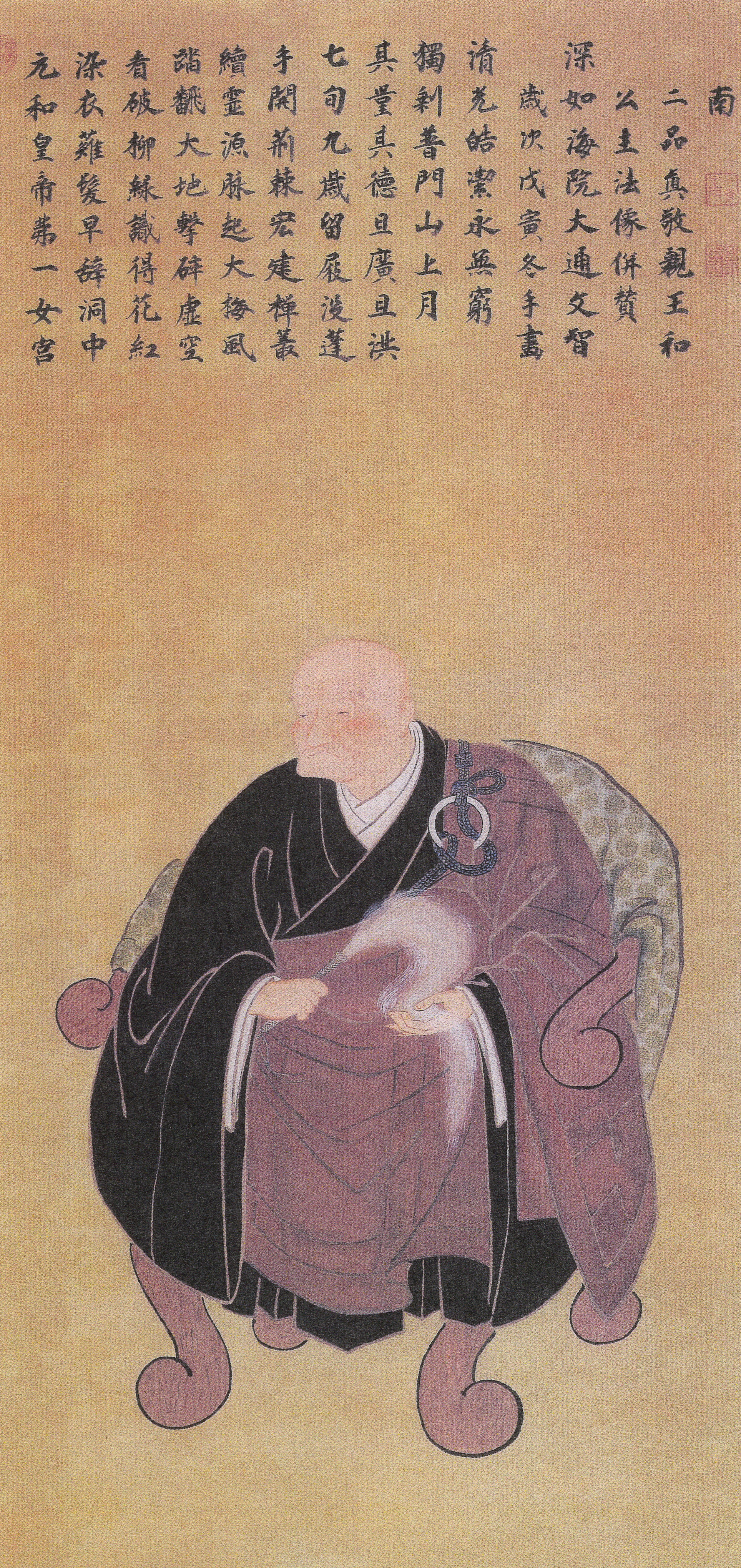 文智女王(後水尾天皇の第一皇女、円照寺開基)の肖像。